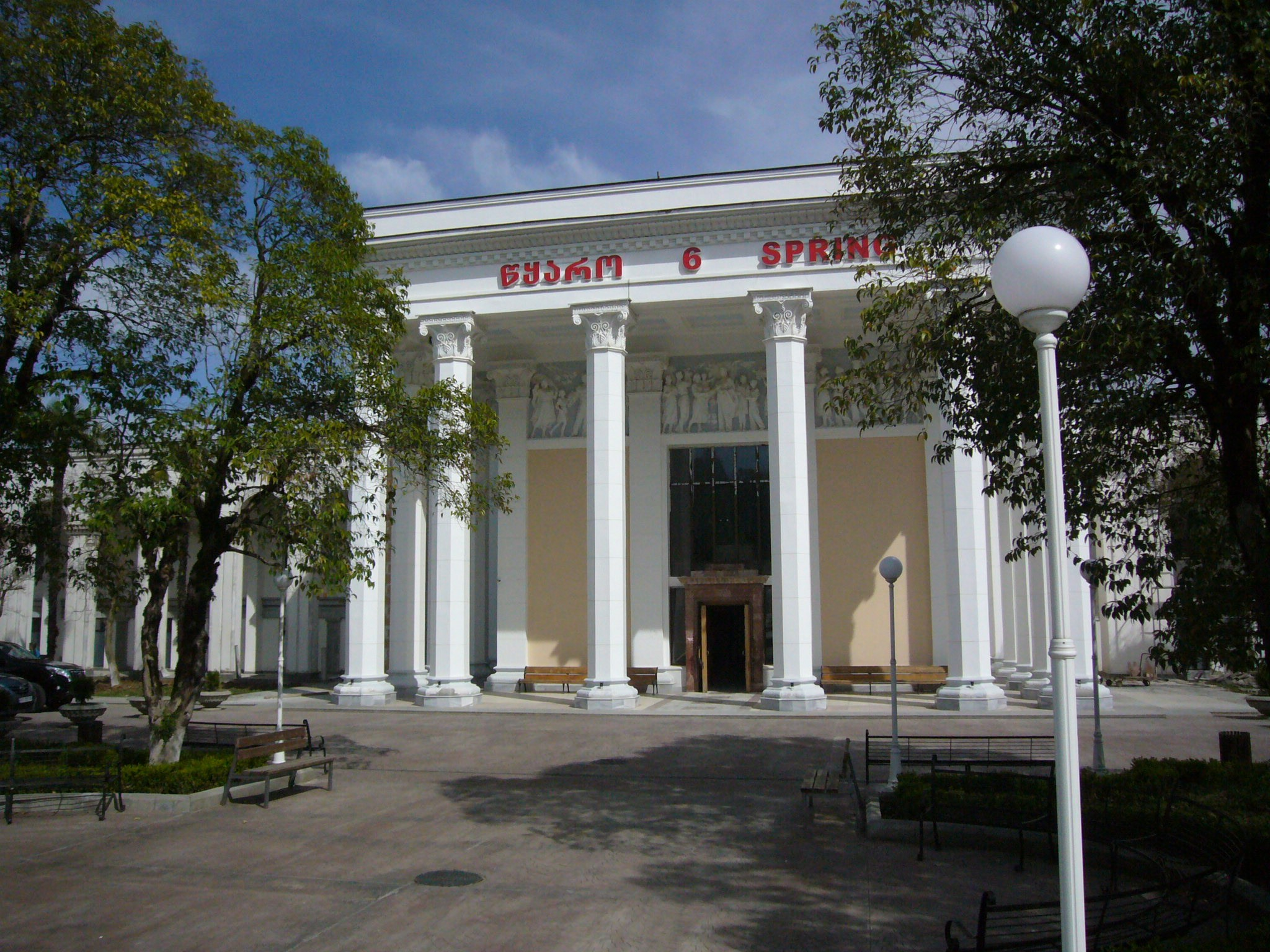 Tskaltubo, Spring No. 6 (2017)